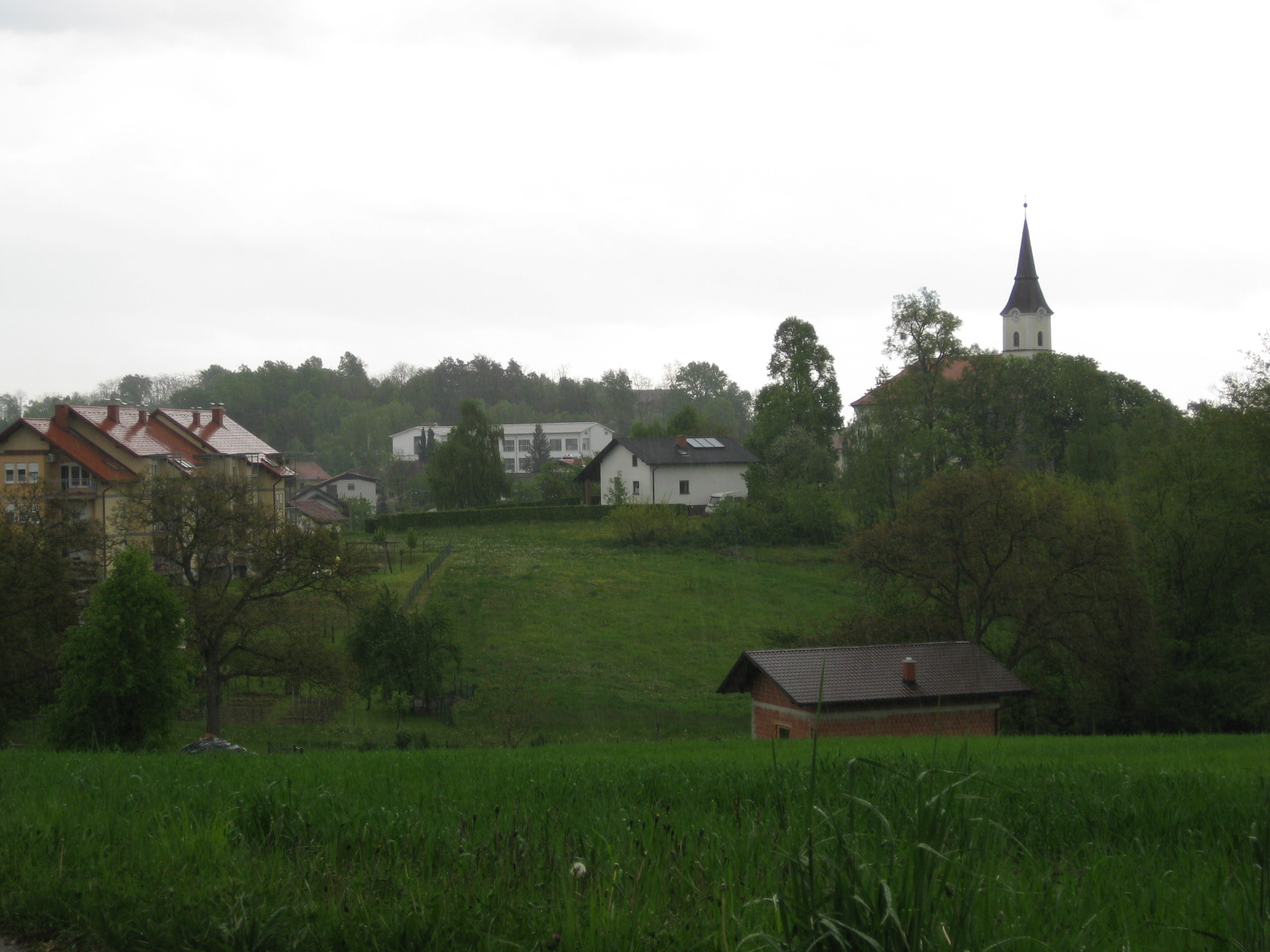 Gornji Petrovci, village in Slovenia